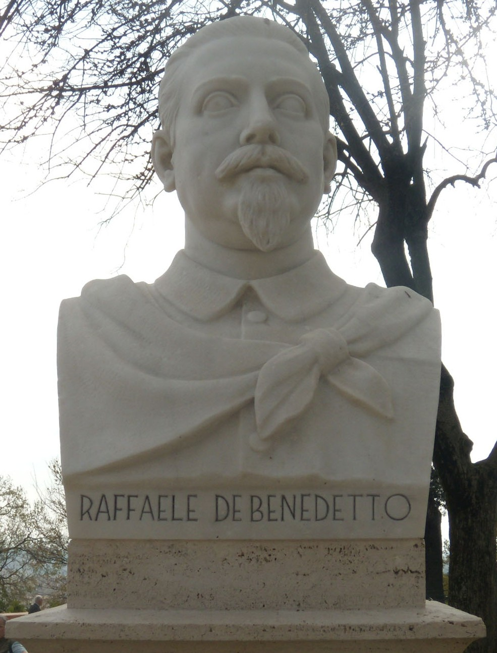 Busto restaurato di Raffaele De Benedetto